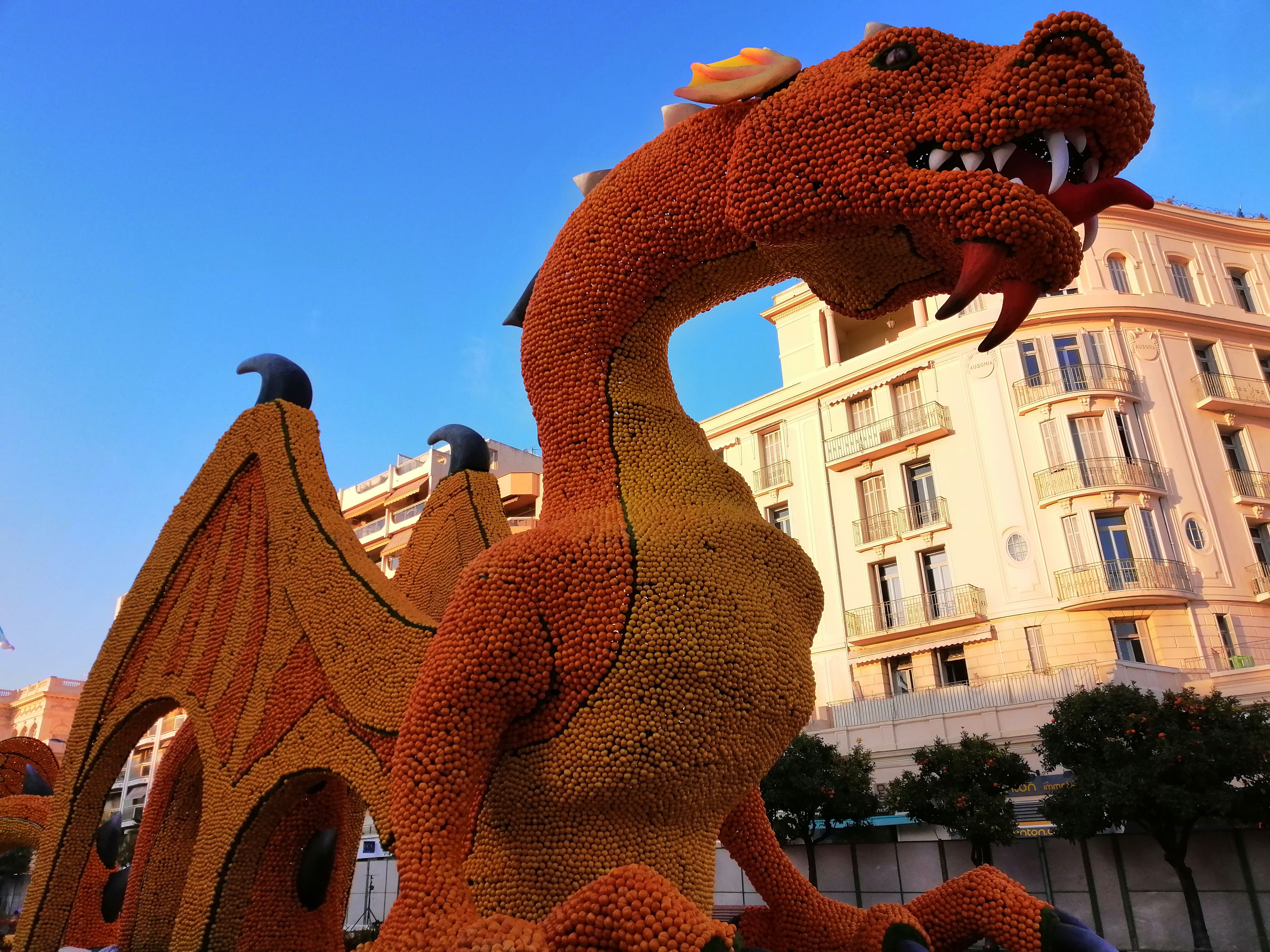 Motif des jardins Biovès de la 86 ème fête du citron de Menton.